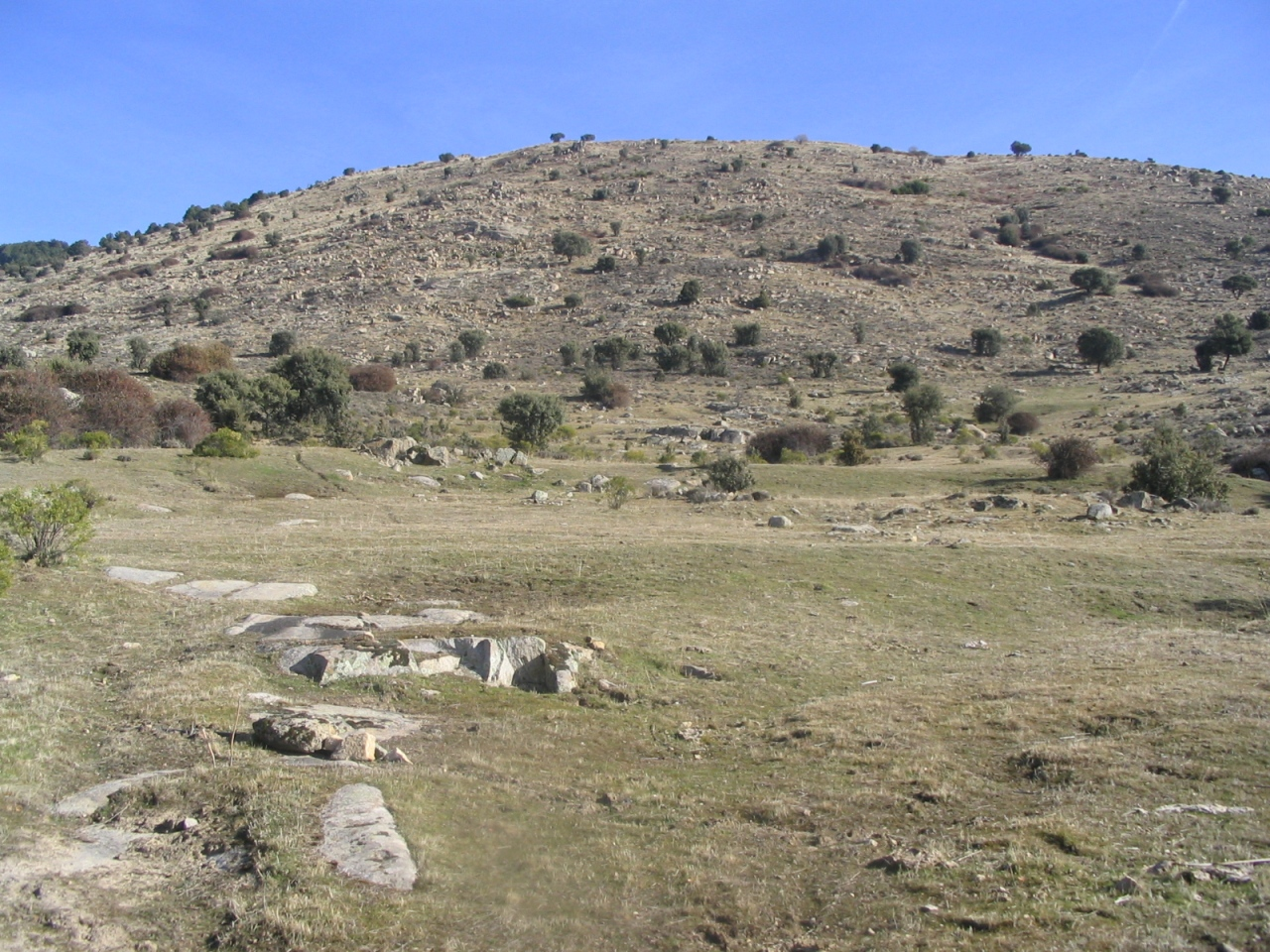 Ladera sur del Cerro Cañal, perteneciente a la Sierra de Guadarrama (España).